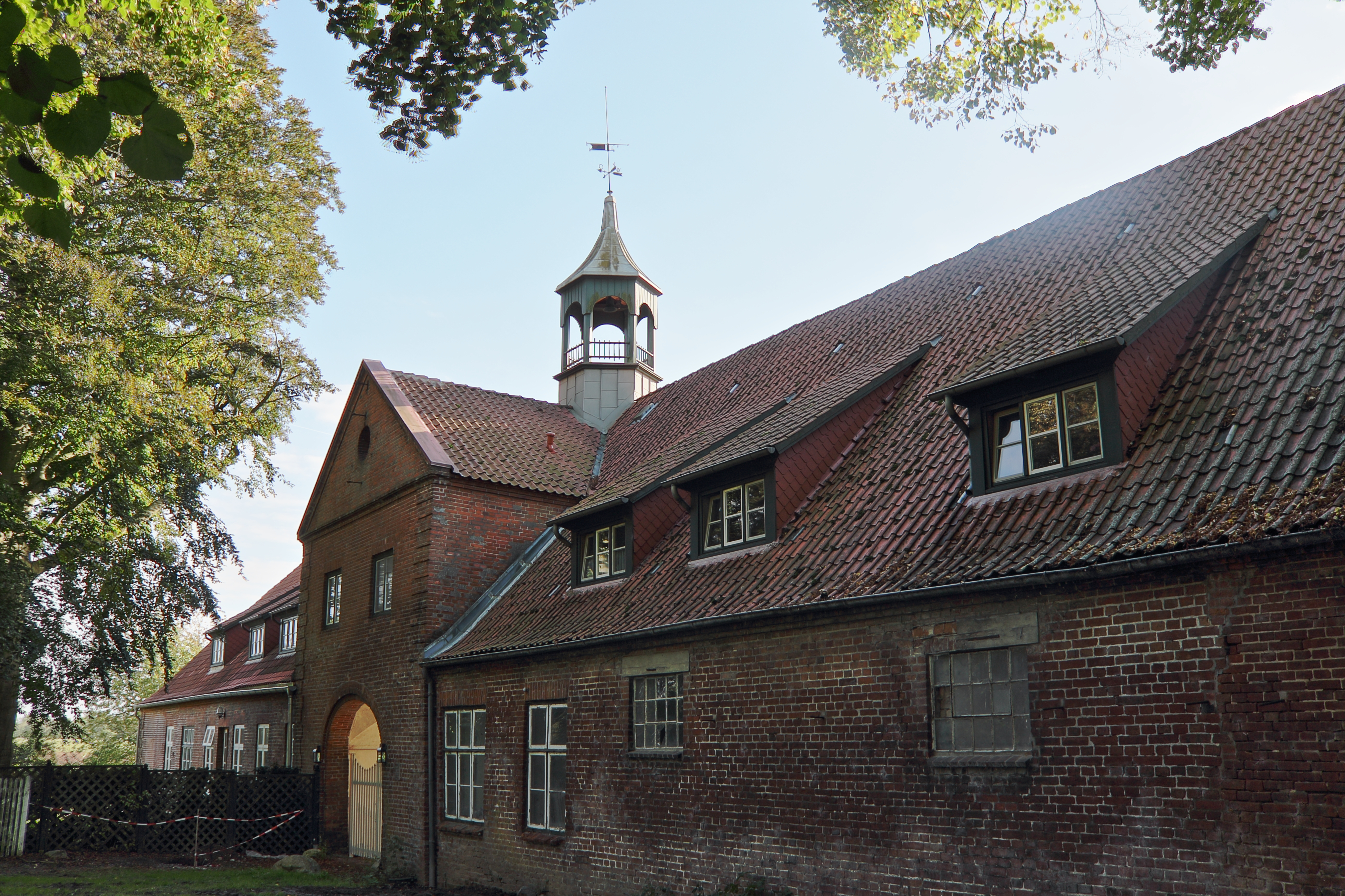 Torhaus des Gut Altfresenburg im Ortsteil Altfresenburg von Bad Oldesloe